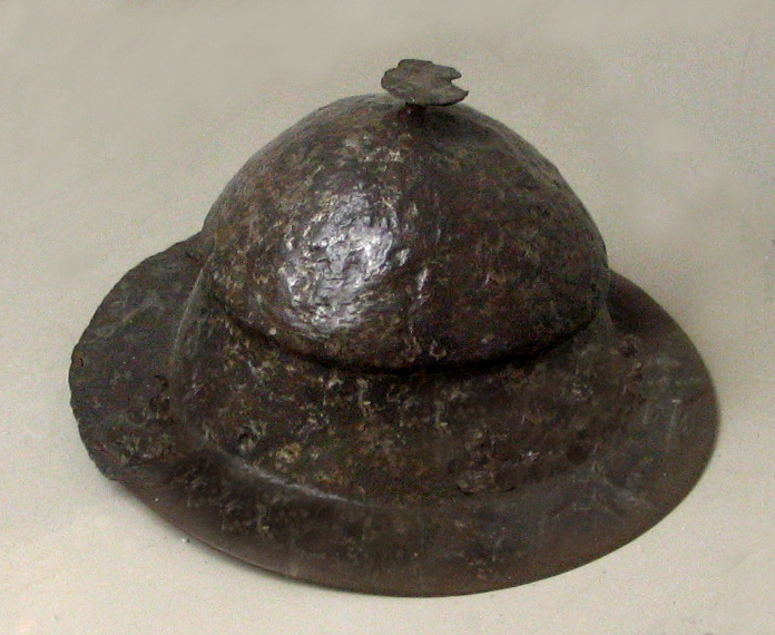 Umbone longobardo proveniente da Fornovo San Giovanni, nell'ex Museo civico archeologico di Bergamo.